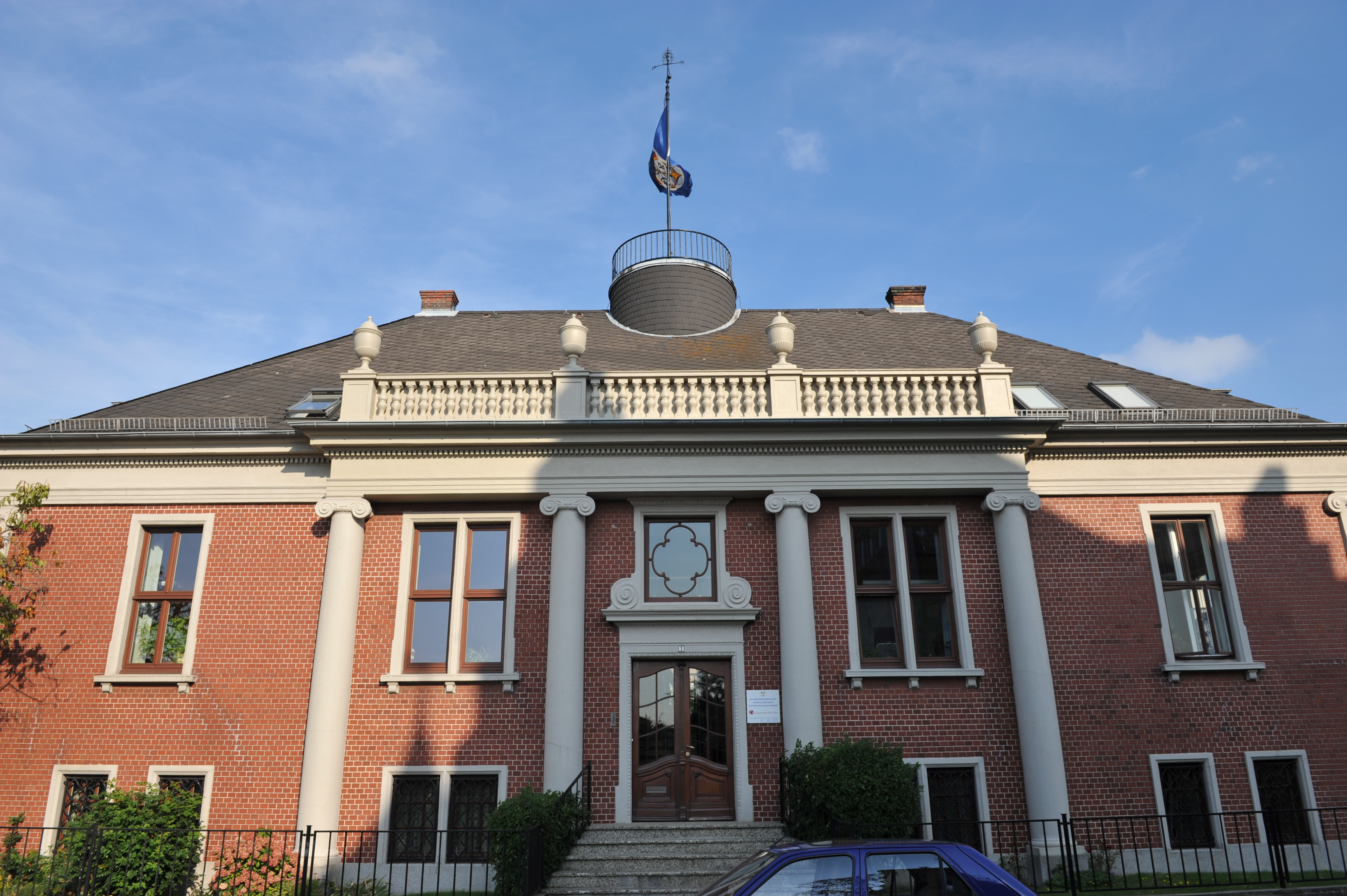 Historical building in Bremerhaven, northern Germany Haus Schuchmann, Bartelstraße 1, 1922 von Heinrich Jäger Das abgebildete Objekt ist ein geschütztes Kulturdenkmal in der Freien Hansestadt Bremen, mit der Nr. 1632 beim Landesamt für Denkmalpflege registriert.